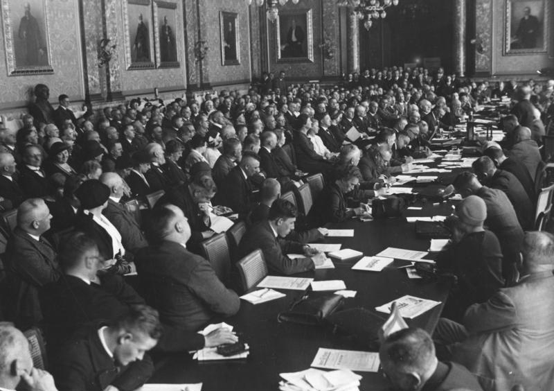 Reichsführertagung der DNVP im Festsaal des Landtags. Geheimrat Dr. Quaatz spricht über Die Wiederherstellung Deutschlands_Unsere Ziele und die Regierung Papen.